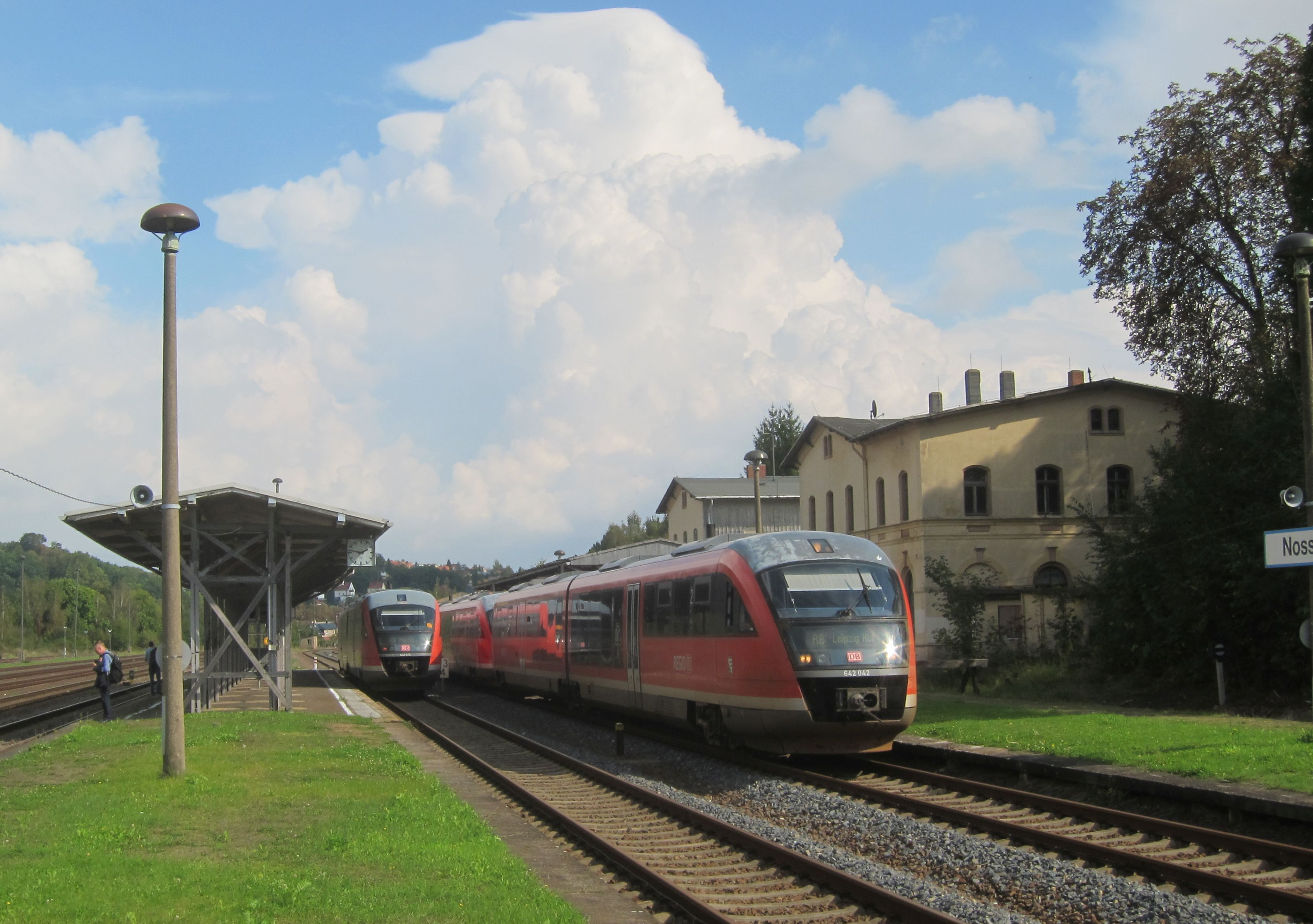 Bahnhof Nossen, Bahnsteige, und Kreuzung der Züge in Richtung Meißen (links) und Leipzig